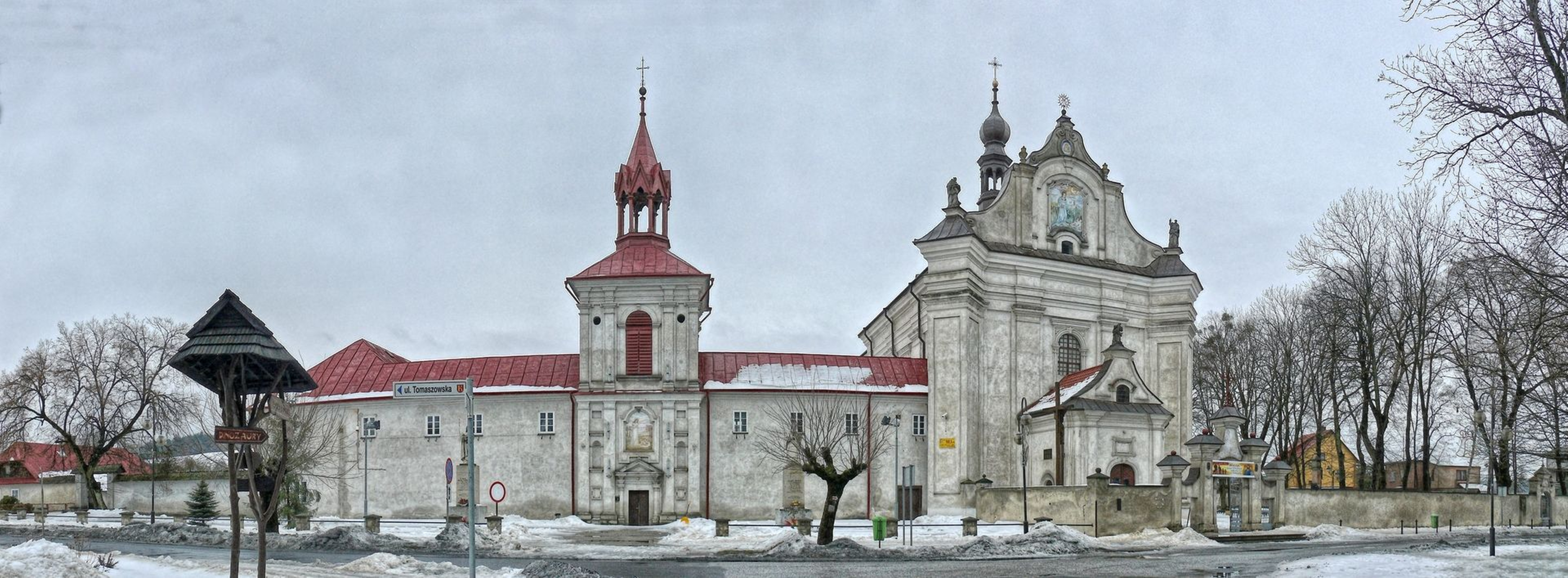 Panorama kościoła p.w. Nawiedzenia Najświętszej Marii Panny w Krasnobrodzie